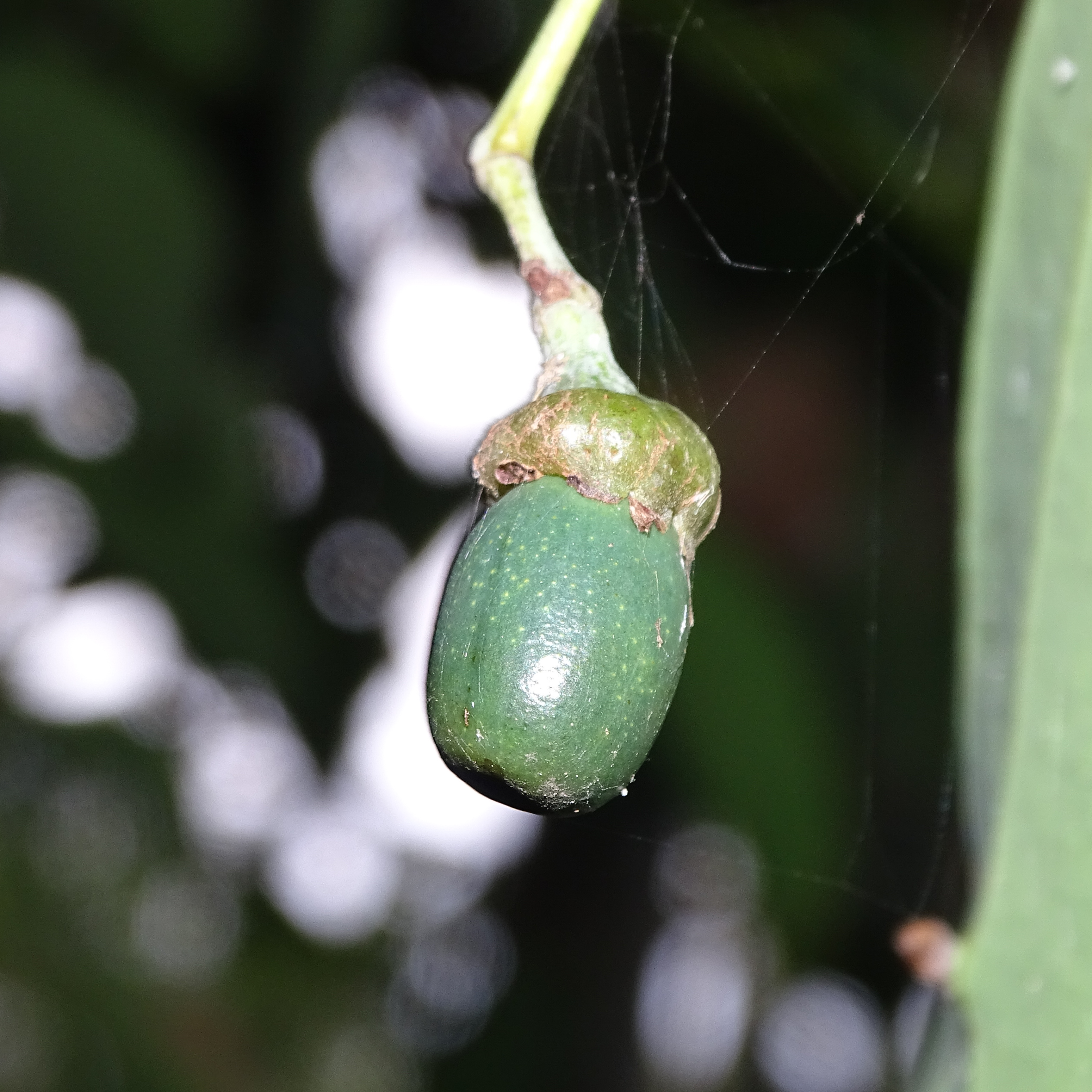 Cinnamomum verum, Cinnamon. From Ezhupunna